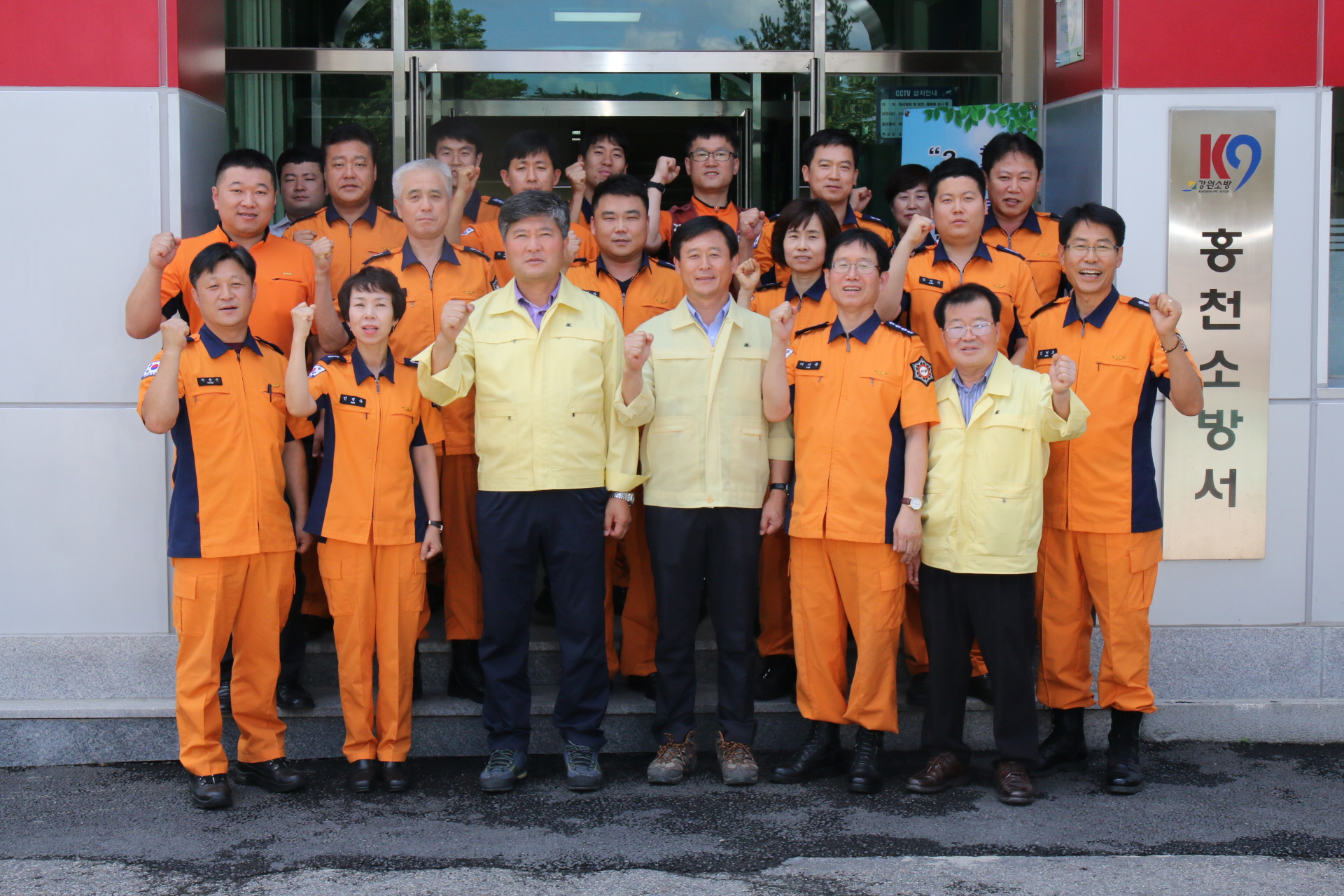 2017년 7월 25일 강원도의회의원 김동일 등 홍천소방서 격려방문